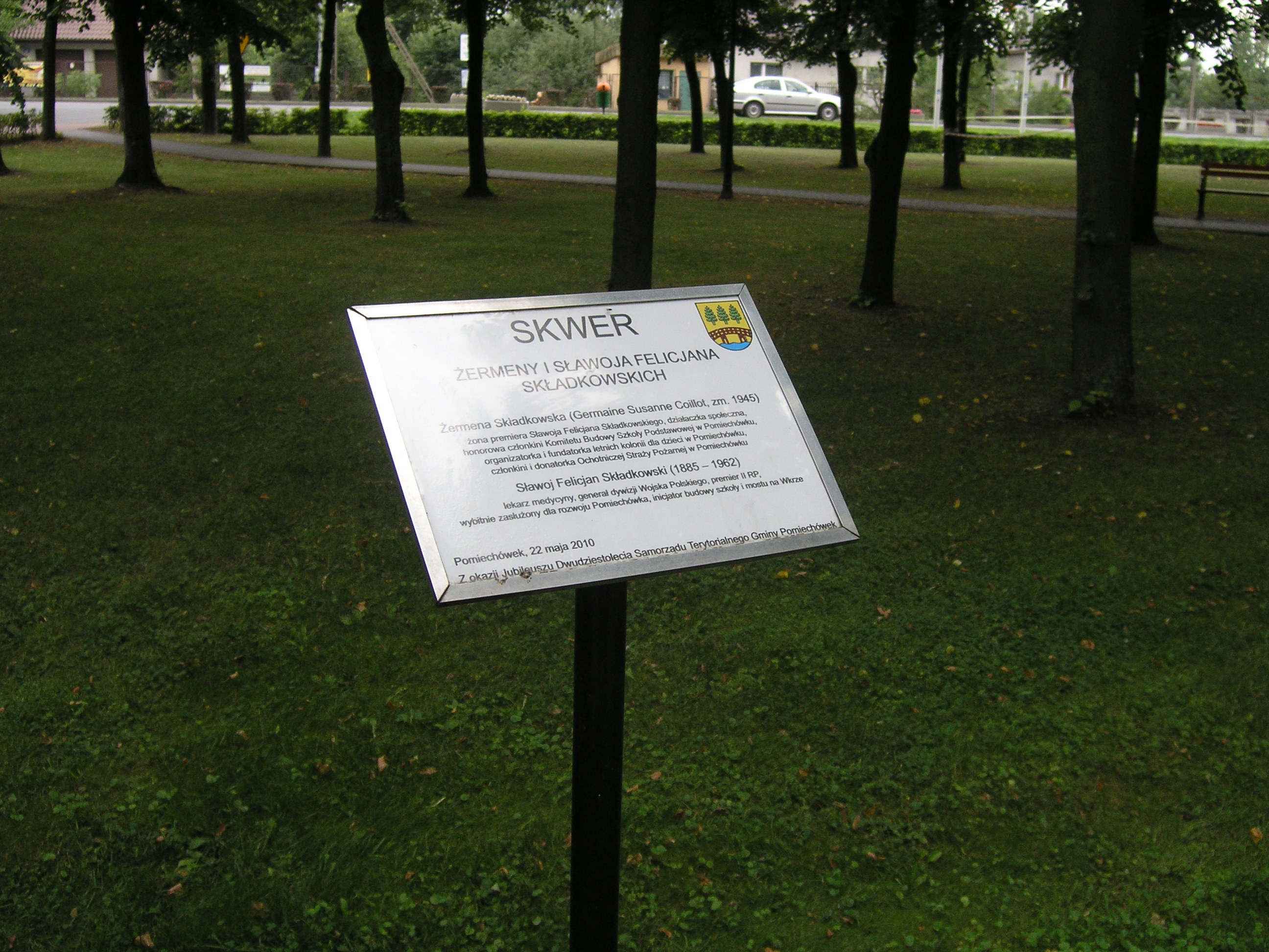 Skwer w centrum Pomiechówka nazwany w 2010 r., z okazji Jubileuszu Dwudziestolecia Samorządu Terytorialnego Gminy Pomiechówek, imieniem zasłużonego dla Pomiechówka małżeństwa Żermeny i Sławoja Felicjana Składkowskich. Żermena Składkowska była honorową członkinią Komitetu Budowy Szkoły Podstawowej w Pomiechówku, organizatorką i fundatorką letnich kolonii dla dzieci i członkiniż oraz domatorką lokalnej Ochotniczej Straży Pożarne, a jej mąż – premier II RP – gen. Sławoj Felicjan Składkowski, był inicjatorem budowy lokalnej szkoły i mostu na Wkrze, popularyzatorem Pomiechówka jako miejscowości wypoczynkowej oraz inicjatorem powstania drogi do Pomiechowa.